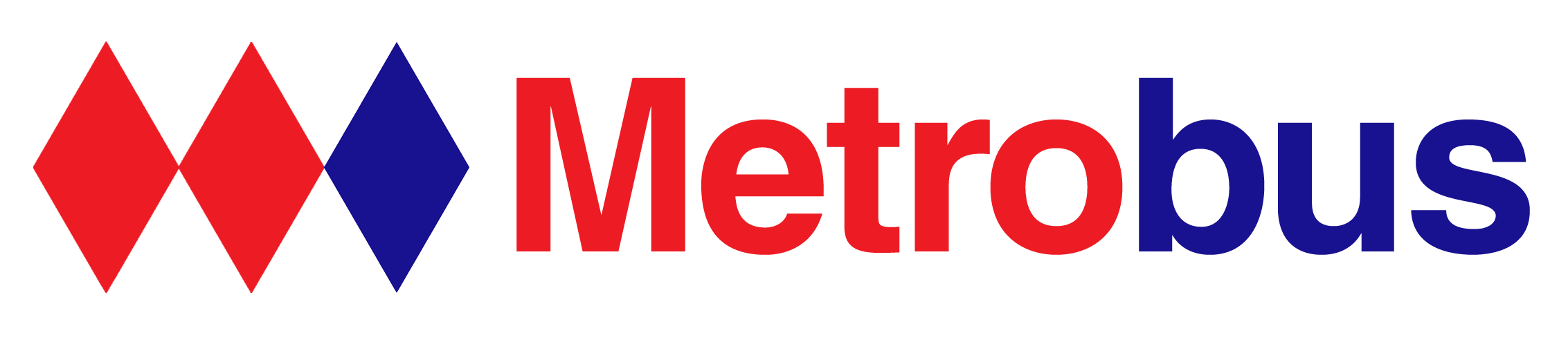 Antiguo isologotipo de Metrobús.